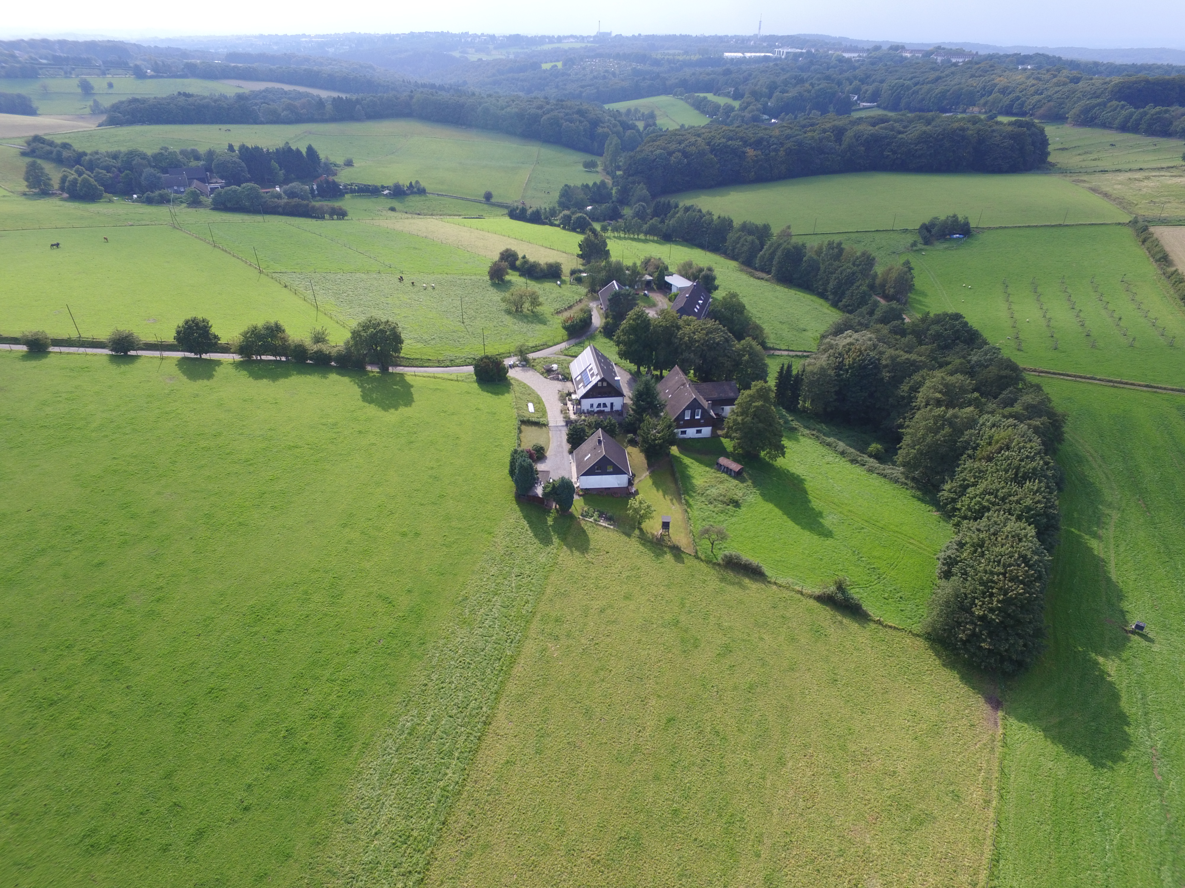 Die zwei alten Wohnplätze der Hofschaft Baur in Wuppertal. Vorne Aufm Baur, hinten Schultenbaur